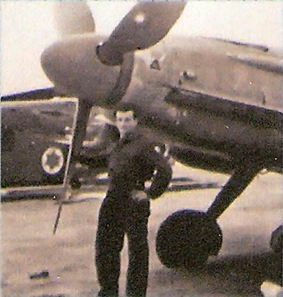 Nori Harel next to Avia S-199 in Israel 1948